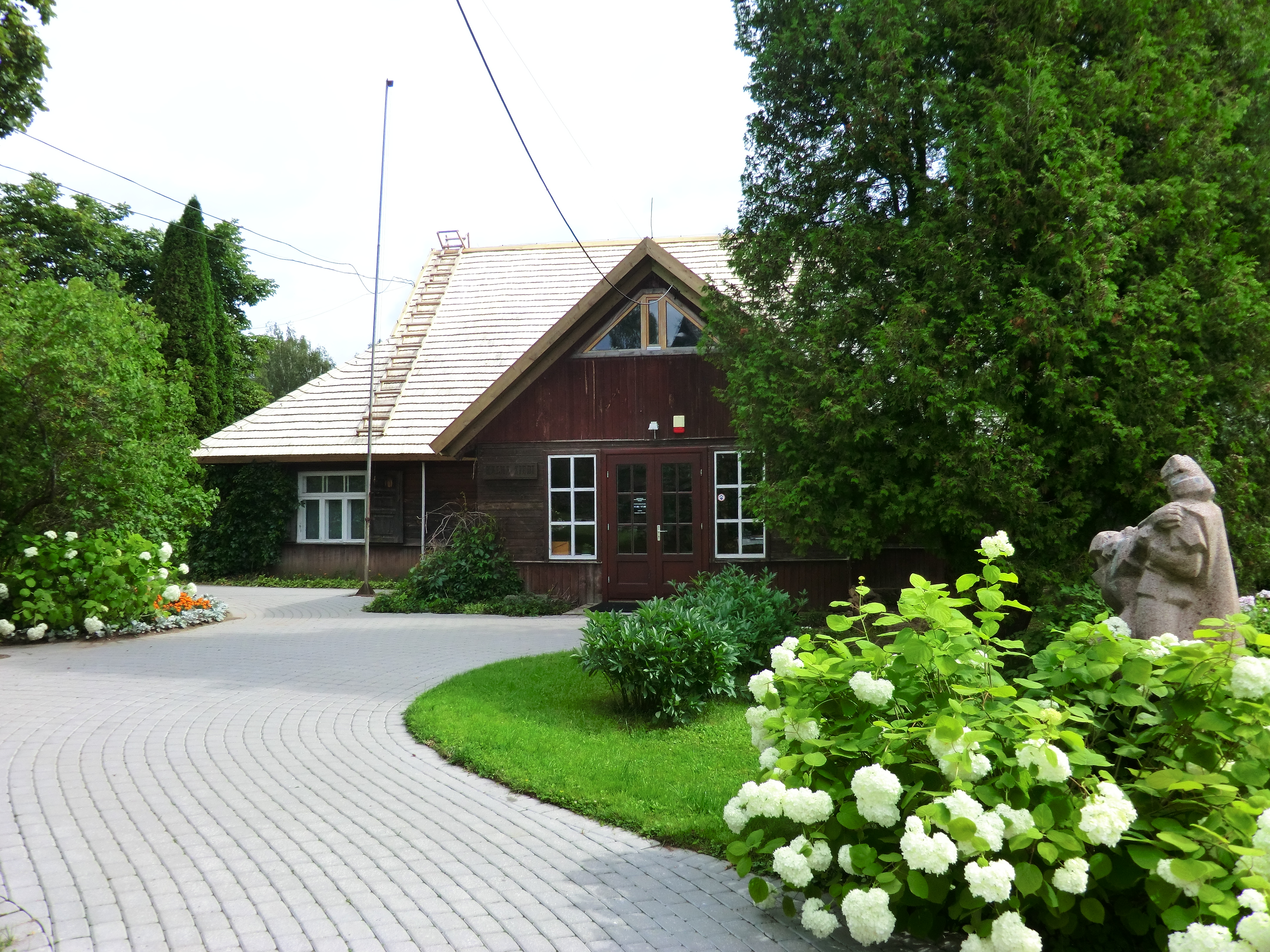 Музей "Кална Зиеди"